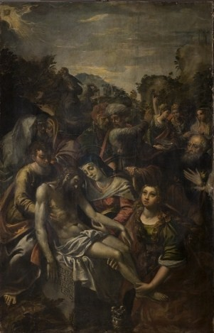 Deposición con santos, Fondazione Cassa di Risparmio, Ferrara